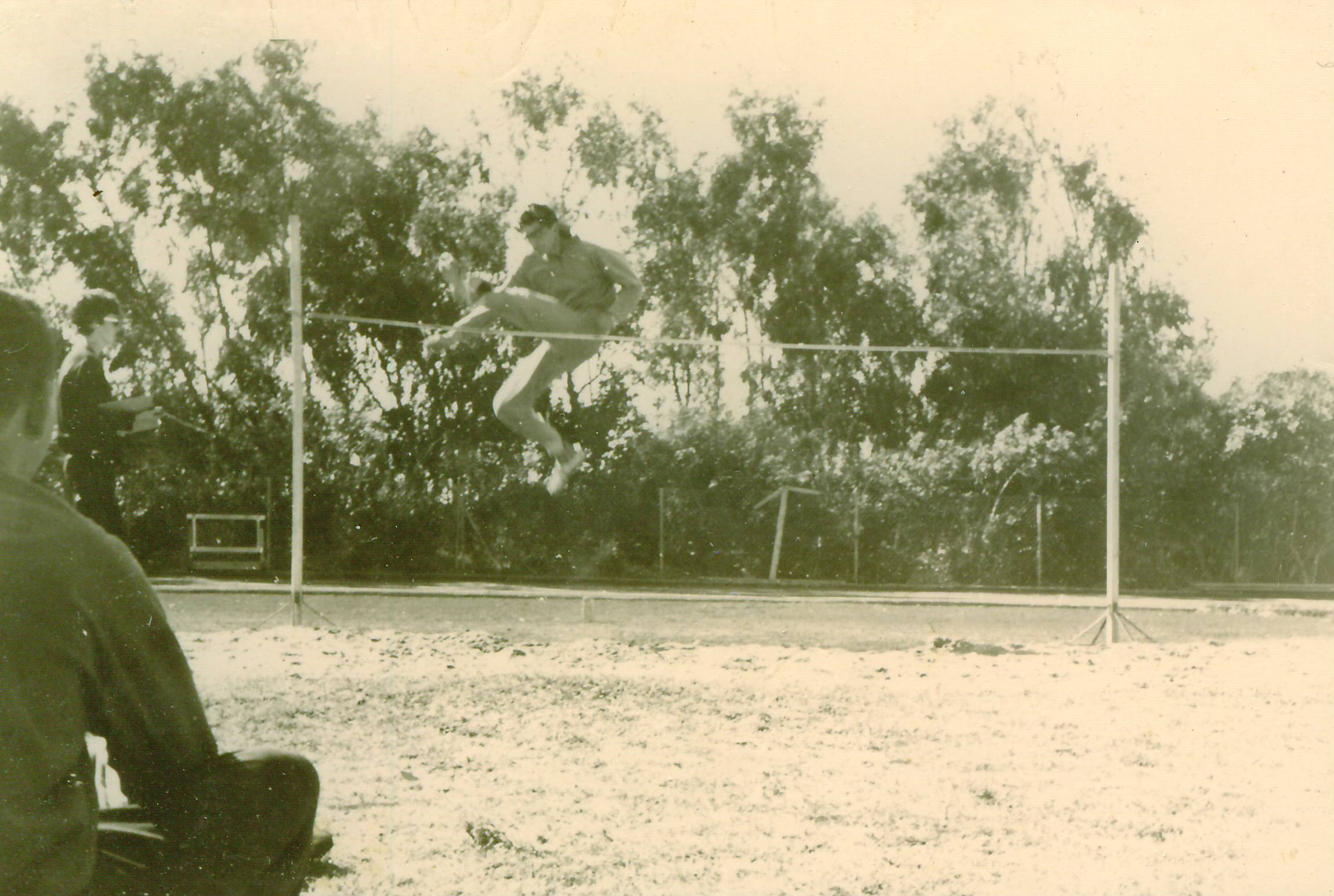 יוסף פיקל באימון קפיצה לגובה, 1965